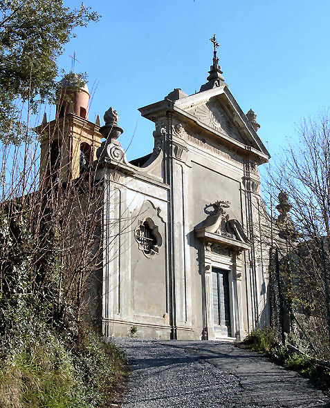 Chiesa di Nostra Signora del Buon Consiglio - Brasile (Bolzaneto)